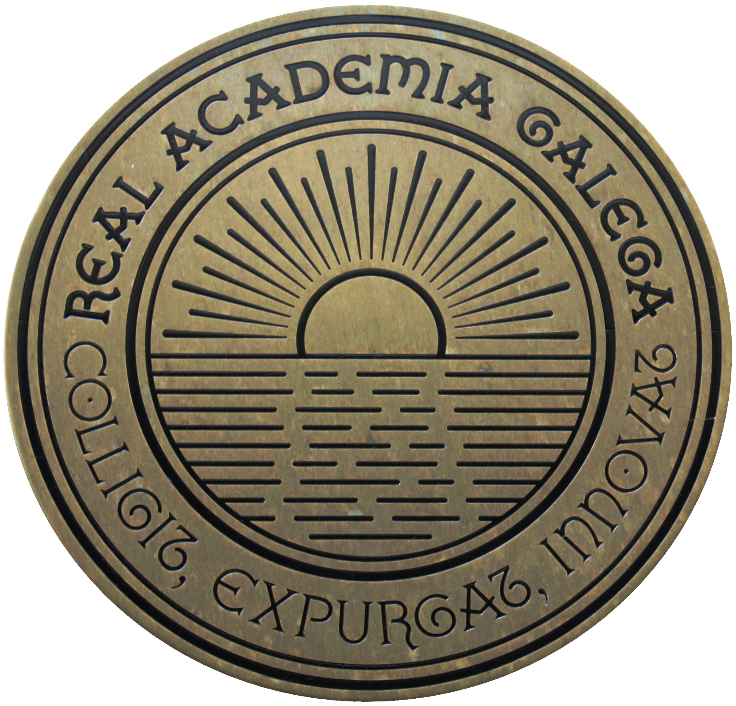 Placa na fachada da Real Academia Galega (A Coruña)